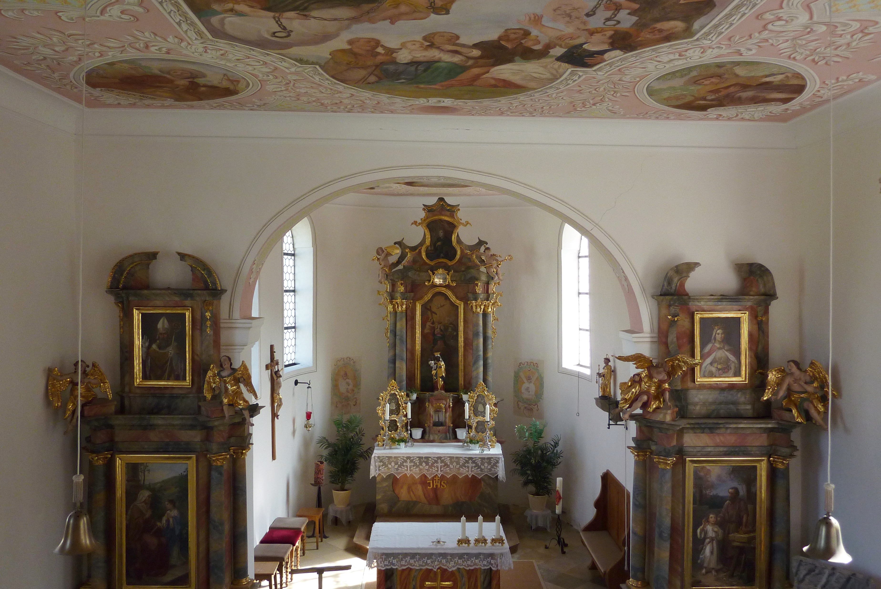 Katholische Filialkirche Hl. Dreifaltigkeit und St. Leonhard in Bocksberg, einem Ortsteil von Laugna im Landkreis Dillingen an der Donau (Bayern), Innenraum mit Blick zum Chor